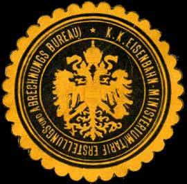 Sealing stamp Title: K.K. Eisenbahn-Ministerium Description: Tarif Erstellungs- und Abrechnungs Bureau. Gelb, schwarz, geprägt Place: Wien size: 4 cm